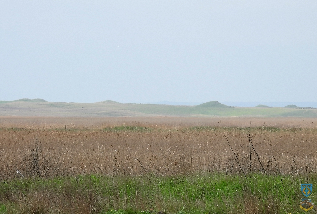 Situl arheologic de la Istria, punct „Movilele Dese”